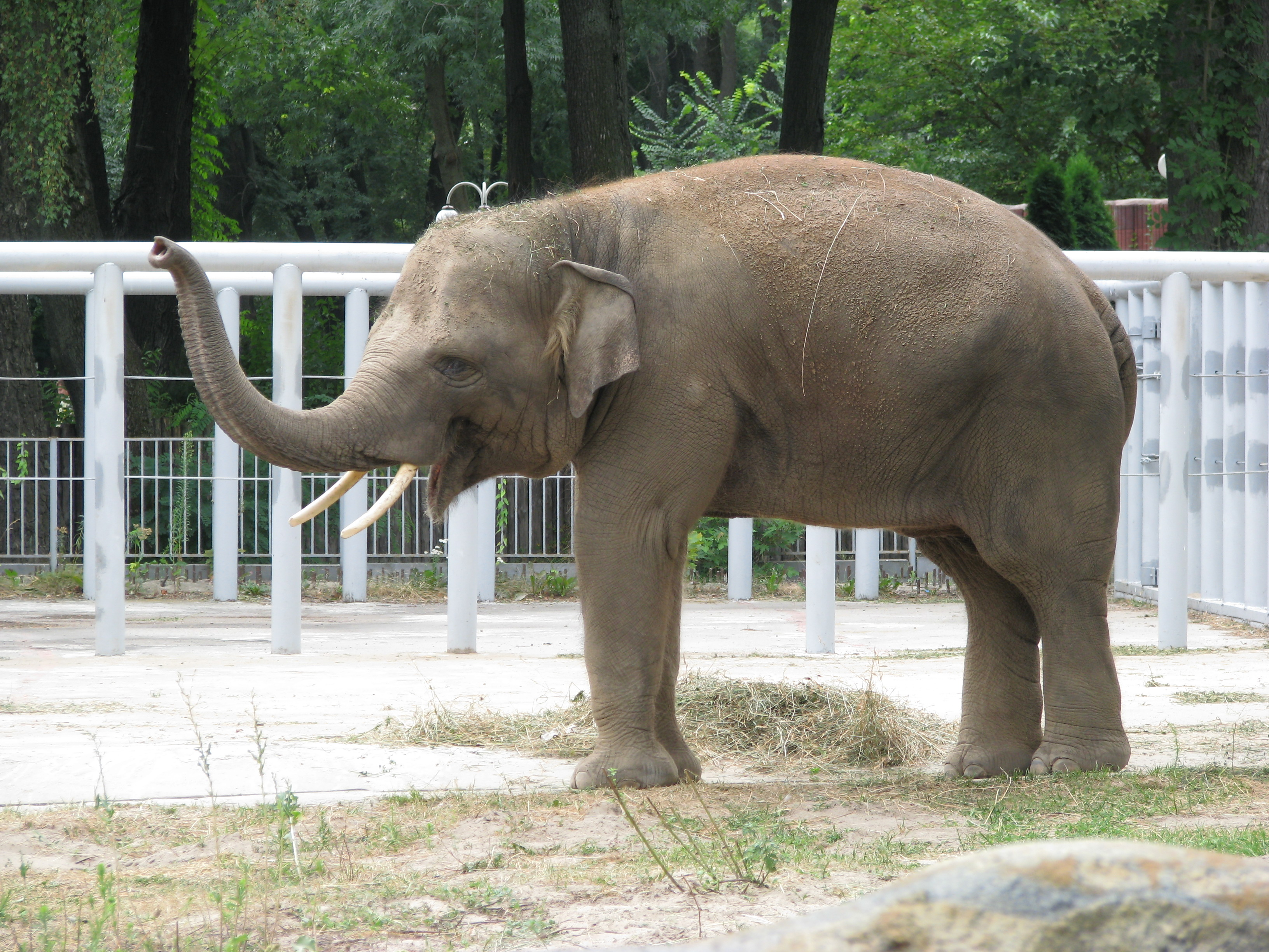 Зоопарк (Київський), Київ, Перемоги просп., 32